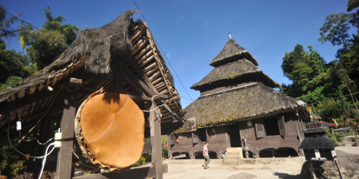 Masjid Tuo Kayu Jao Indonesia